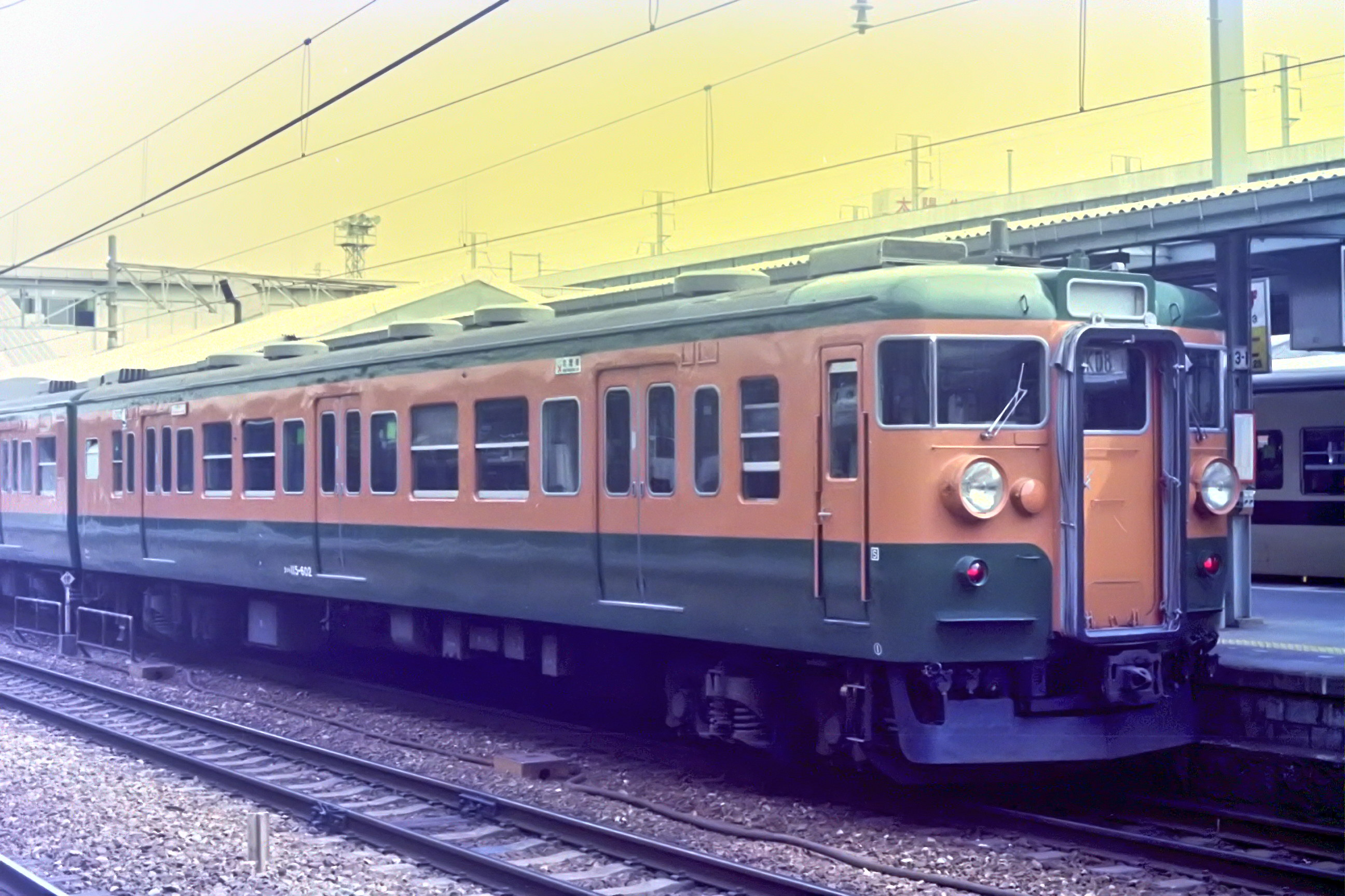 クハ115 602